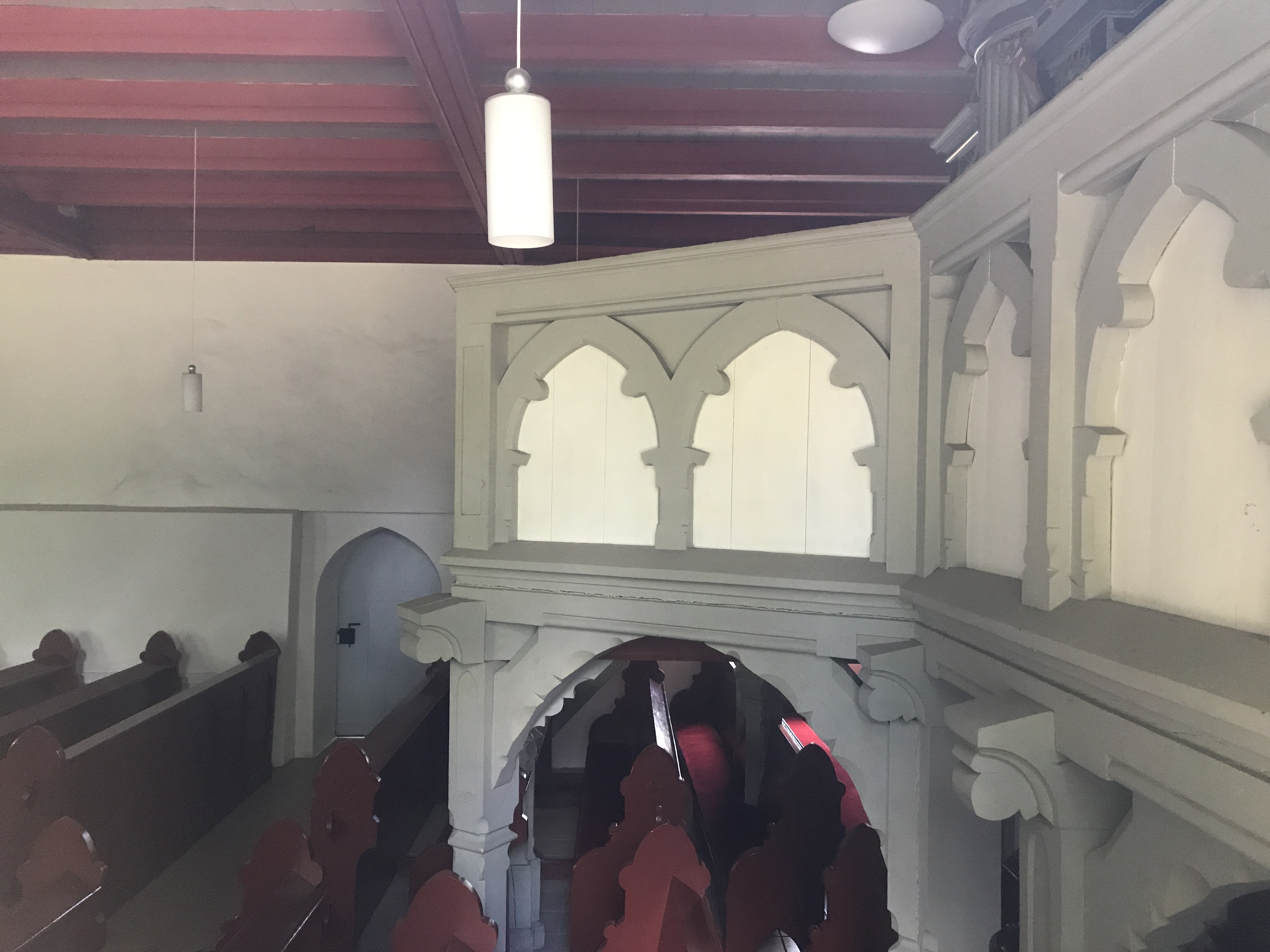 Die Dorfkirche in Altgolßen entstand Anfang des 14. Jahrhunderts und wurde in den Jahren 1899 bis 1902 erheblich umgebaut. Auf dem angrenzenden Friedhof befinden sich bedeutende Gräbdenkmäler aus den Patronatsfamilien des 18. und 19. Jahrhunderts.